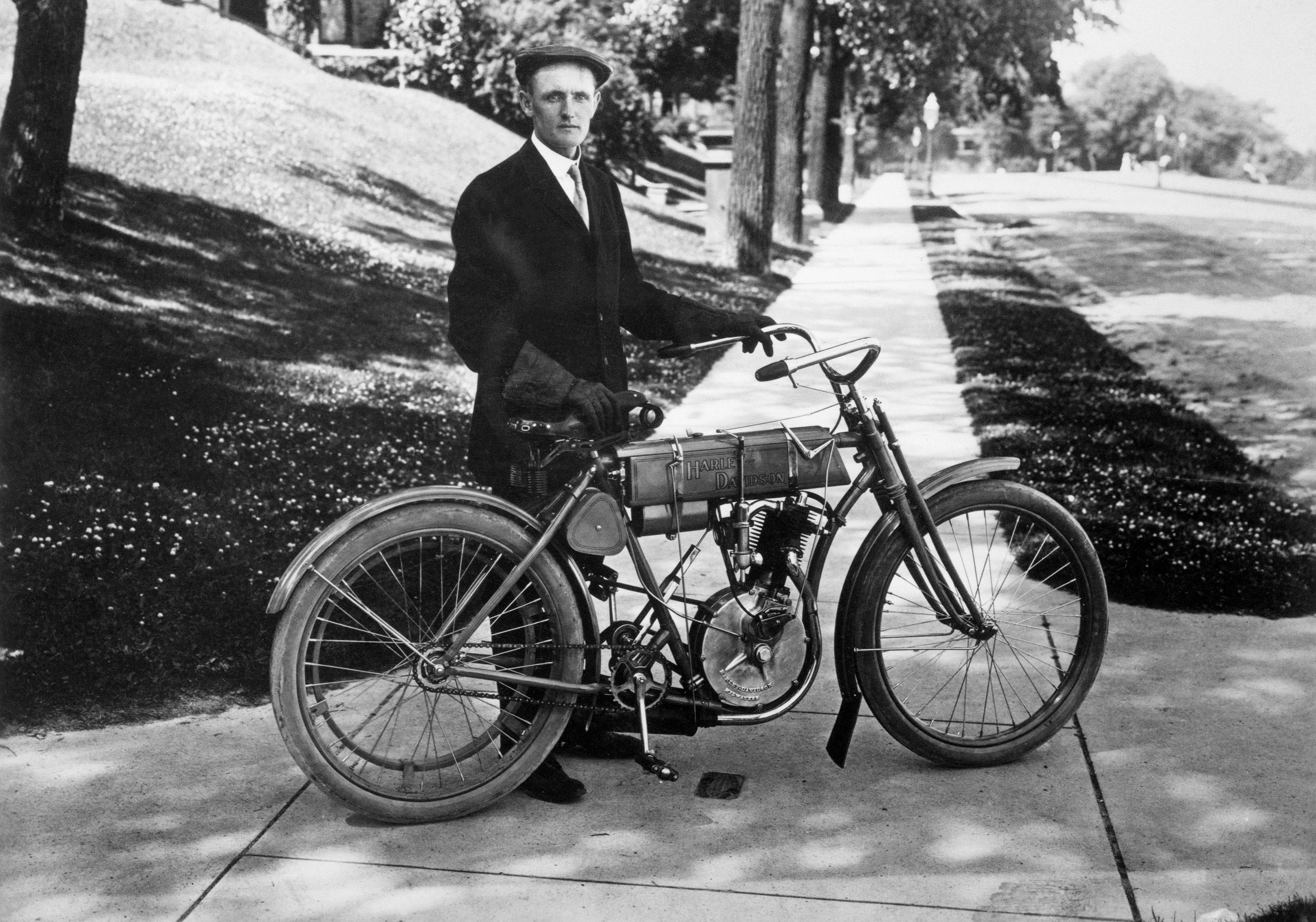 Walter Davidson nach seinem Sieg beim Endurance Rennen 1908)